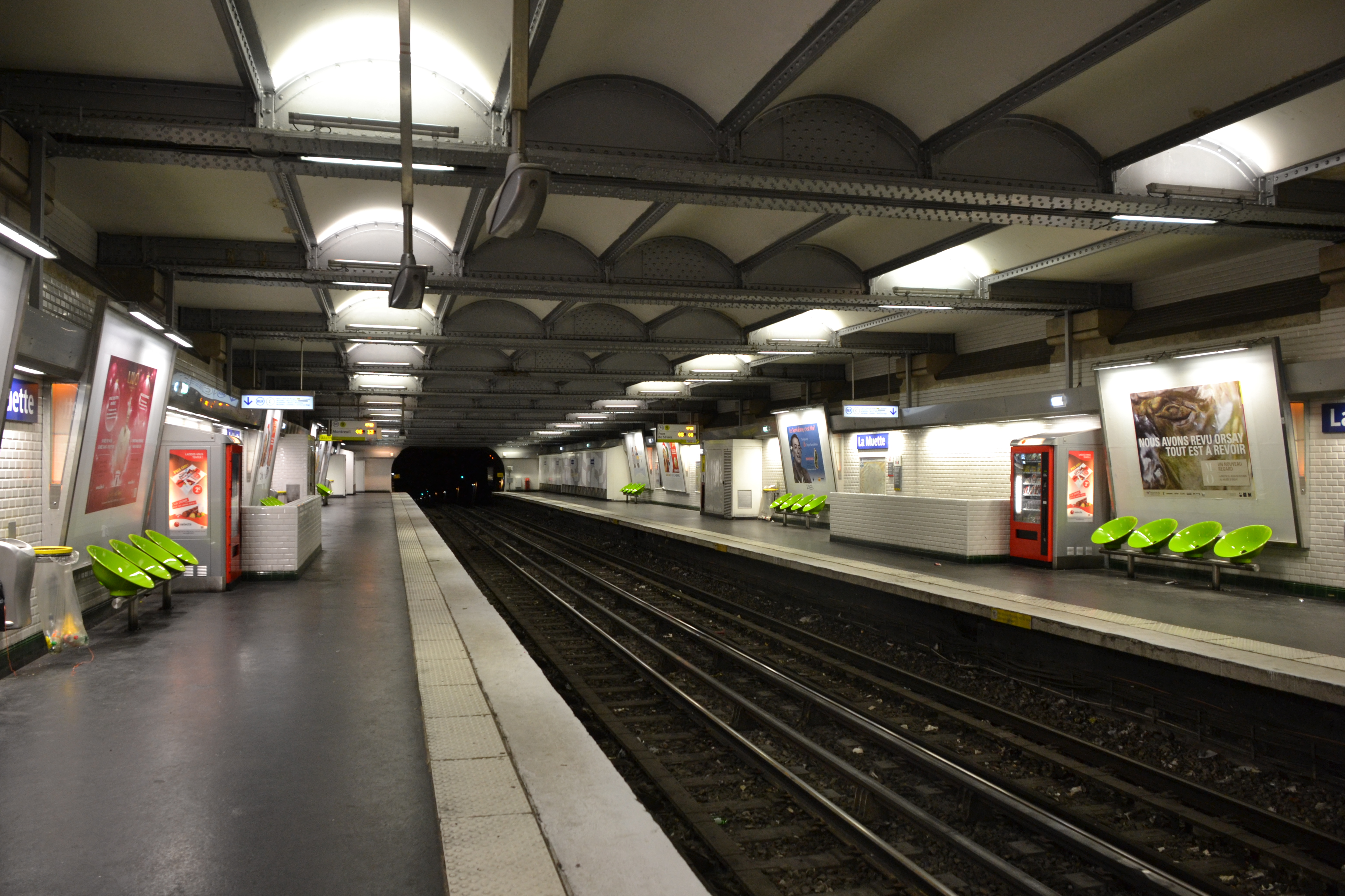 La Muette (Paris Metro)